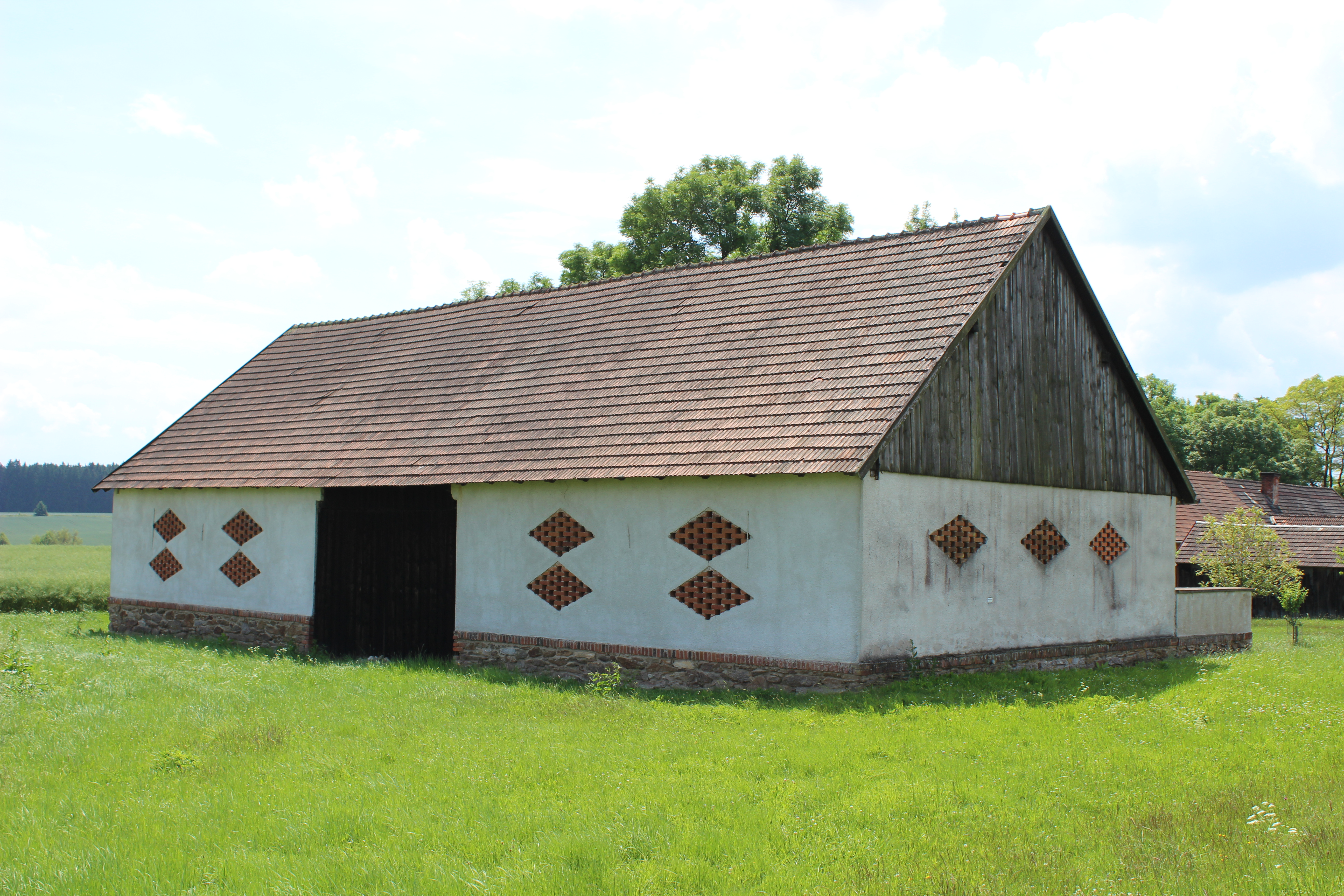 Stodola ve východních partiích Petrovy Lhoty.